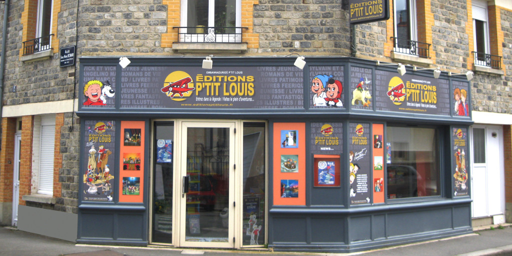 Siège des Editions P'tit Louis